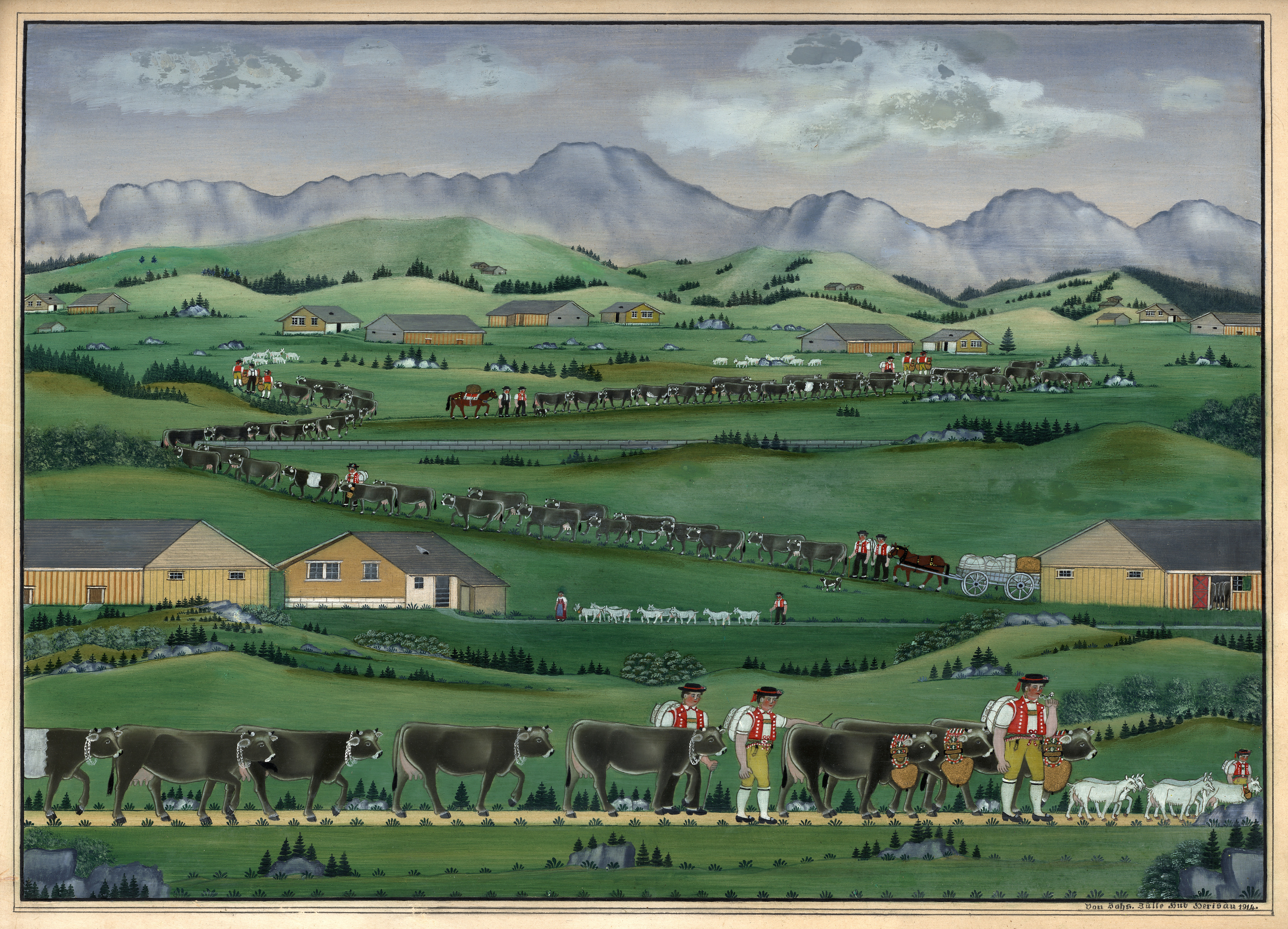 Alpfahrt mit Appenzeller Sennen, Ziegen, Kühen und Pferden mit Lediwagen, auf einem Weg alpwärts, vorbei an Alphütten und kleinwüchsigen Bäumen, inmitten einer hügeligen Landschaft vor einer Gebirgskulisse. Öl und Goldbronze auf Karton, 42 x 59 cm.